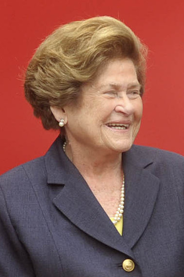 11-01-2012 Entrega premios nacionales